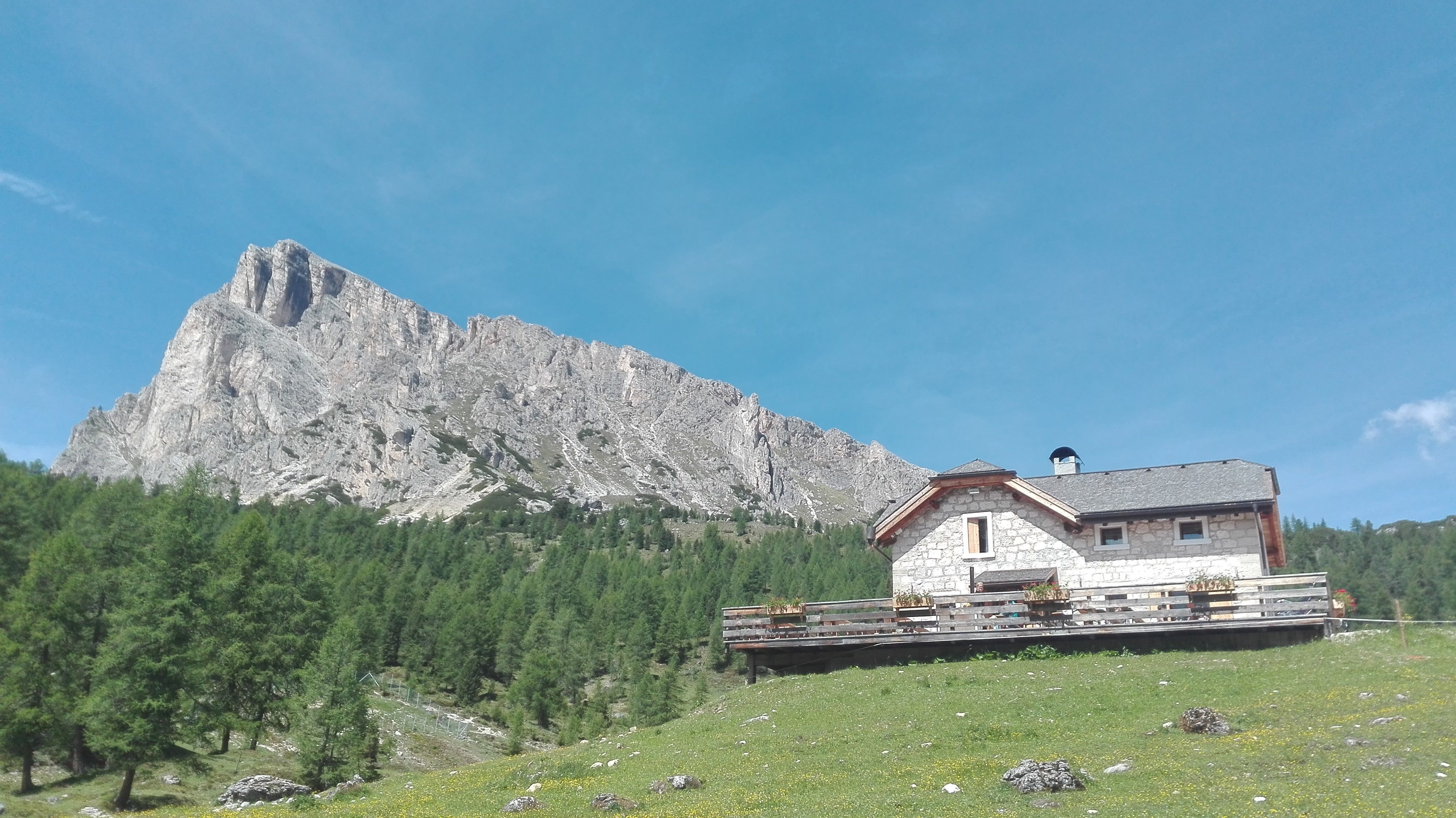 Malga Giau, San Vito di Cadore Categoria:Cadore